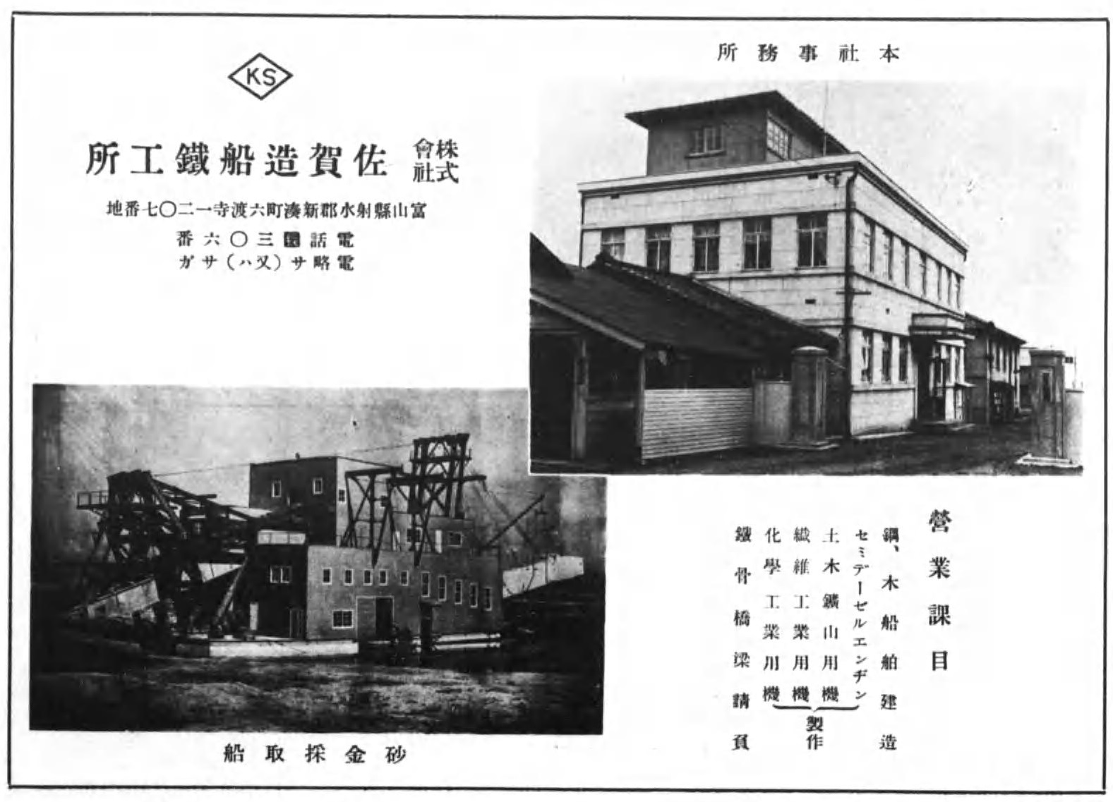 佐賀造船鉄工所